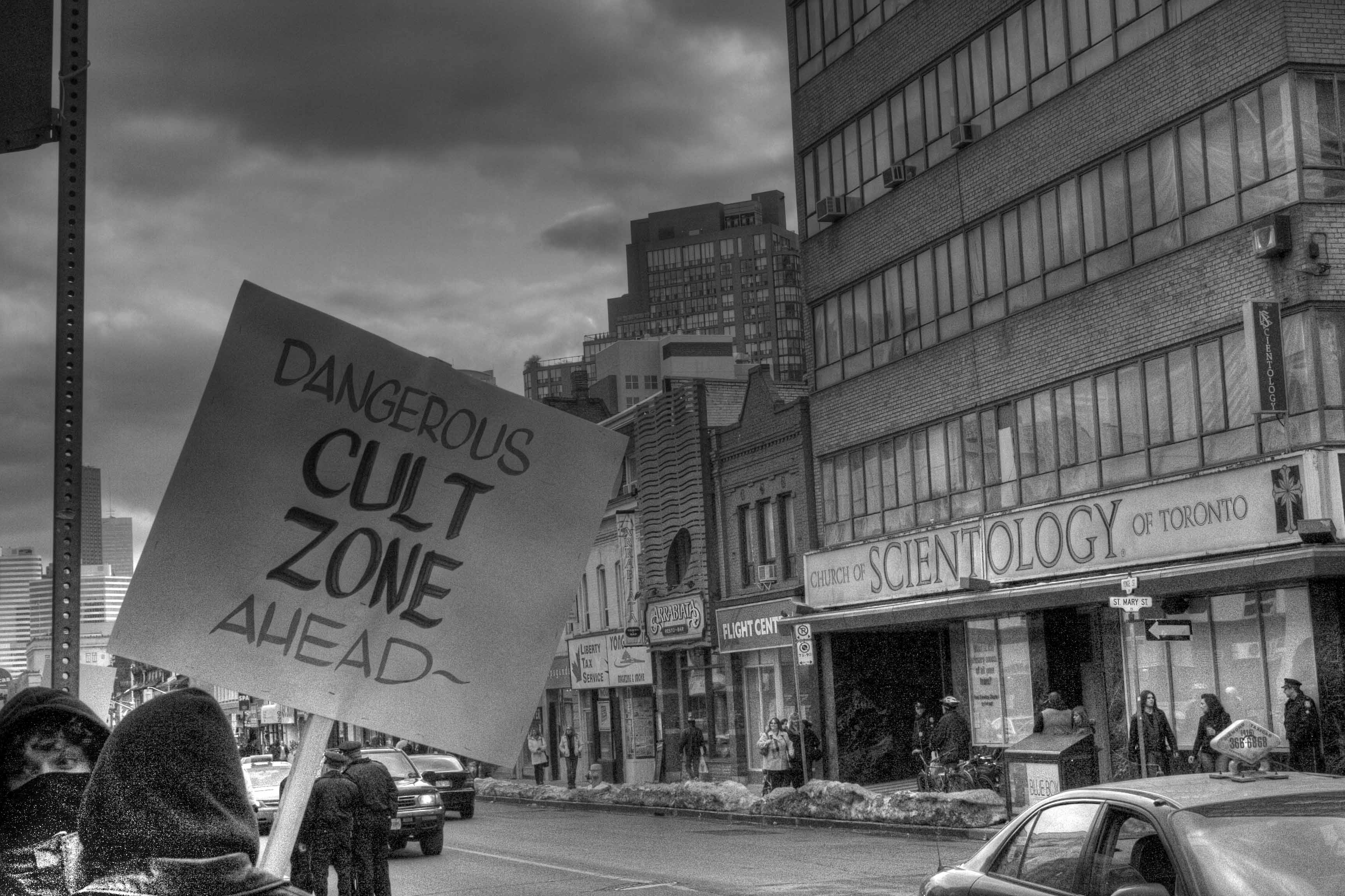 Dangerous Cult Zone